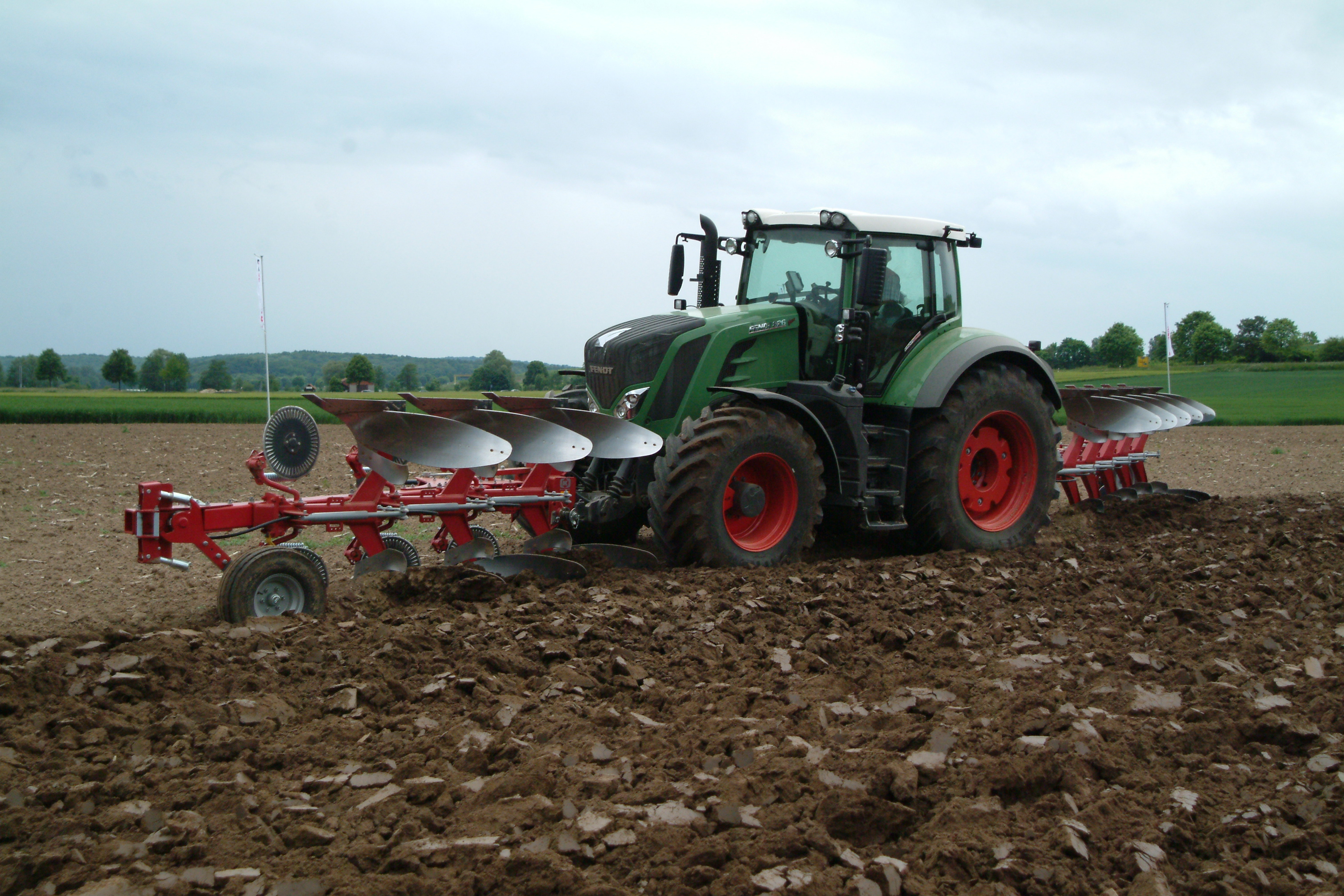 Kongskilde plough